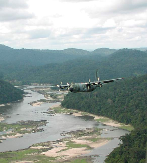 Hercules de l'armée française au Gabon